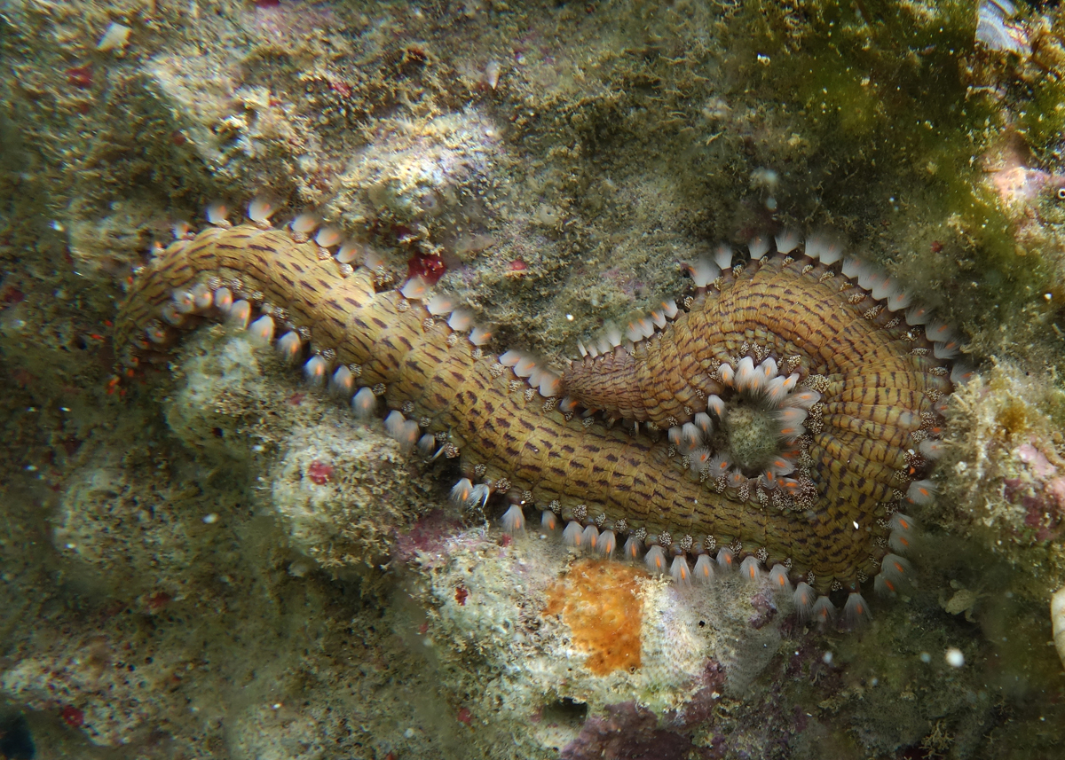 Un ver de feu Pherecardia striata à la Réunion.